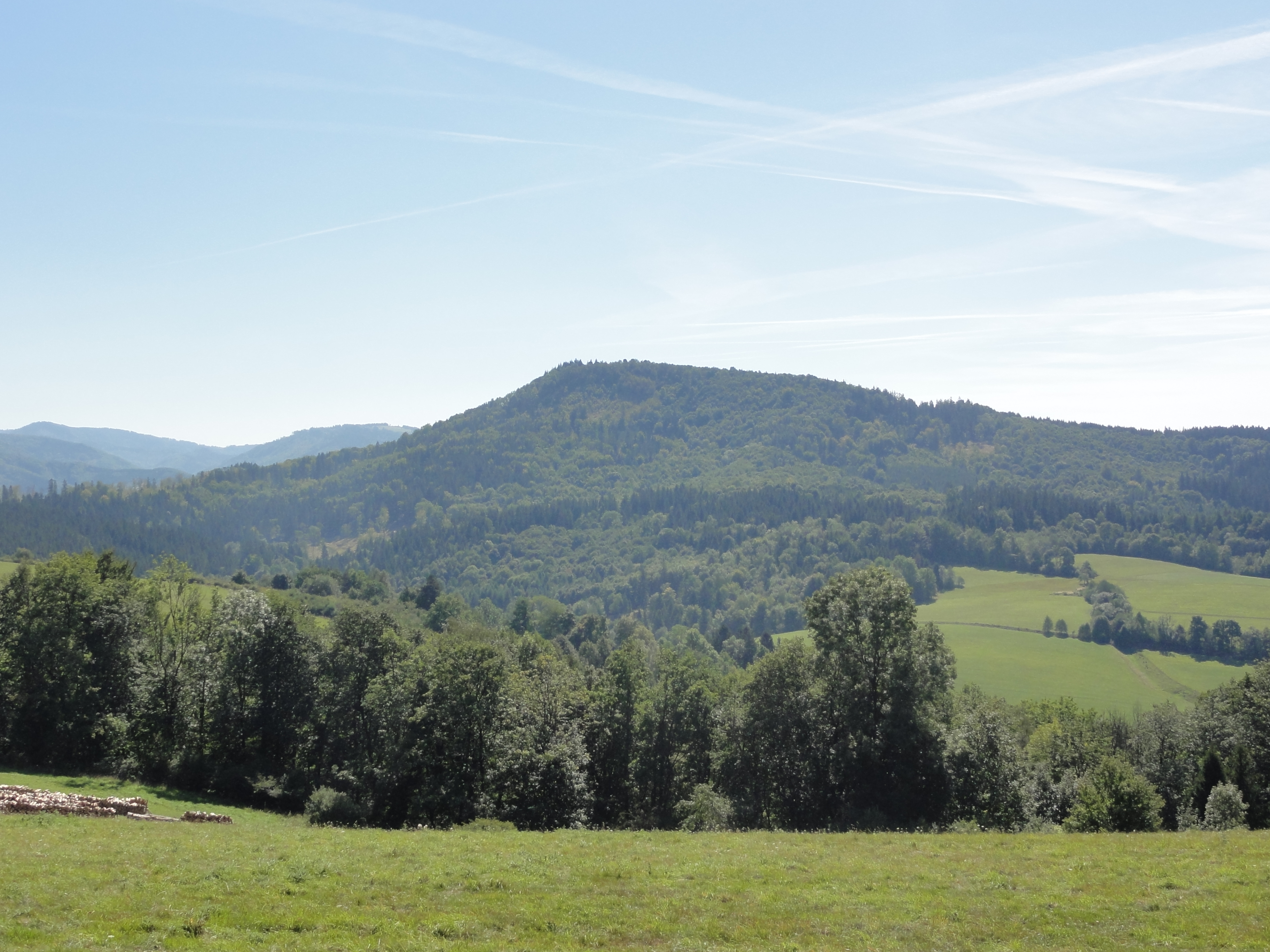 Beskid Śląski Ostry spod Tuła